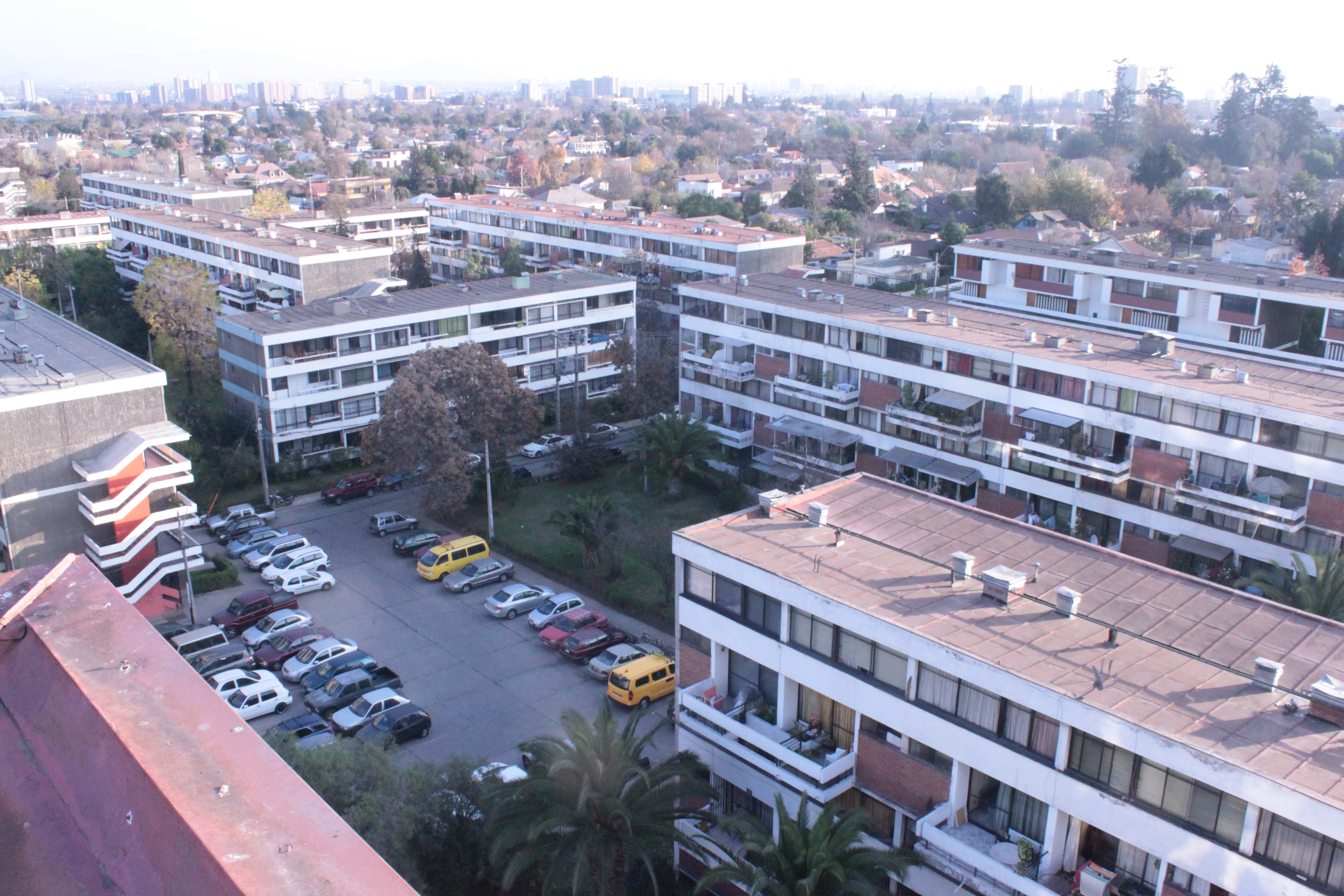 Vista aérea de las unidades bajas del Conjunto habitacional Villa Presidente Eduardo Frei Montalva, comuna de Ñuñoa, Santiago de Chile